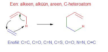 Een-reaktsioon